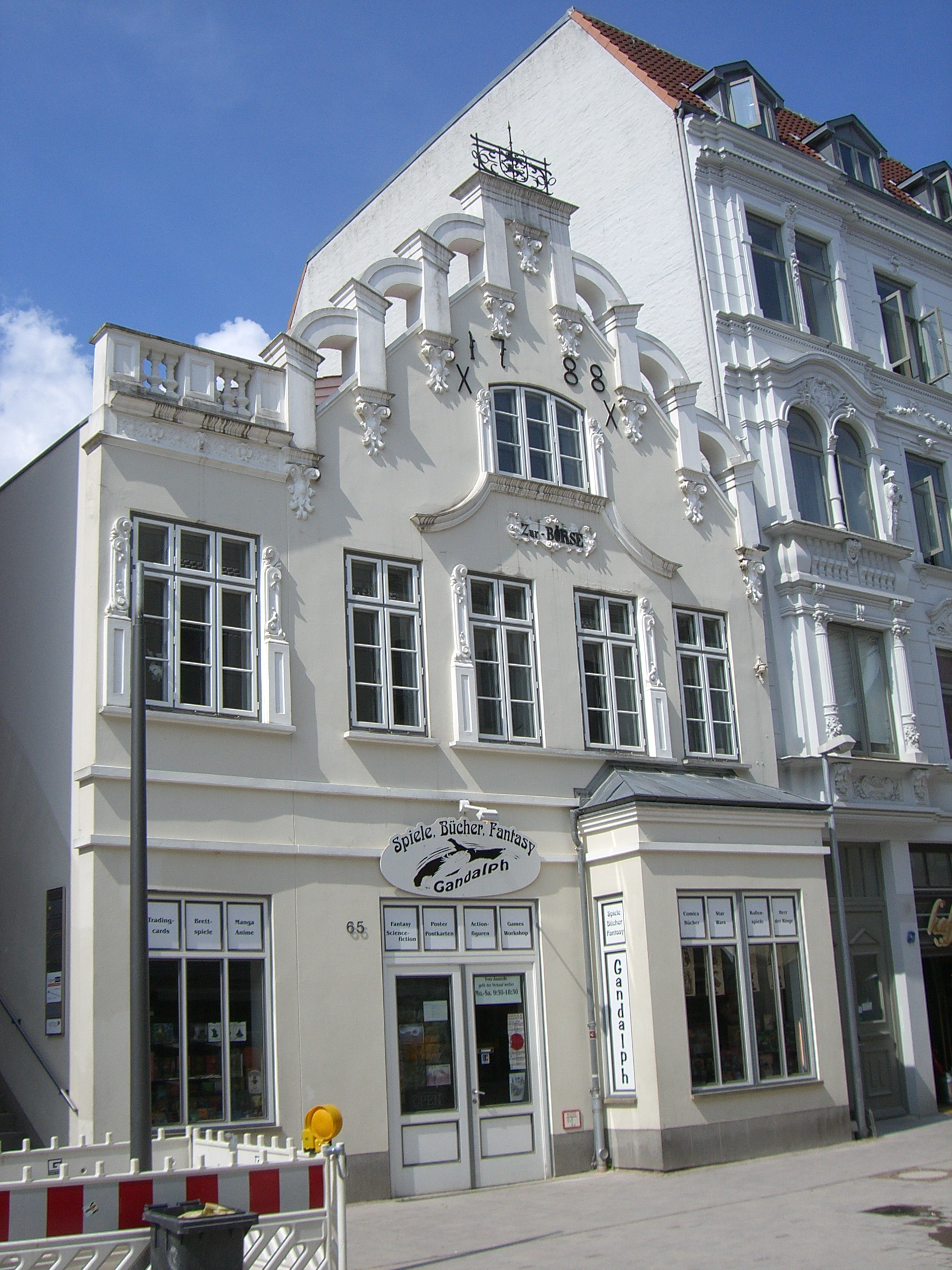 Zur Börse, ein ehemaliges Gasthaus